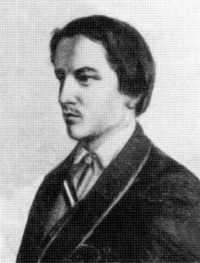 Fotografie (?) von Graf Hugo von Lerchenfeld-Köfering als Bonner Preuße